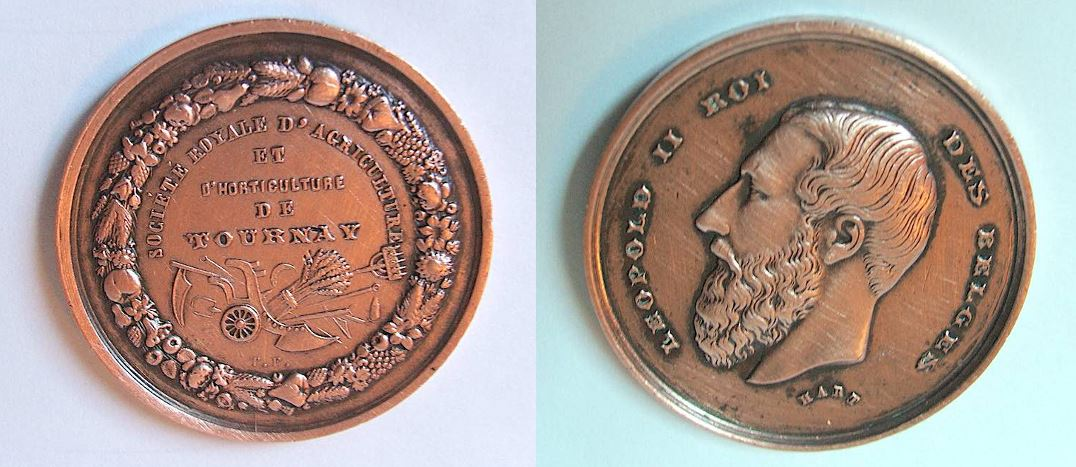 Victor E Gautreau Médaille exposition Tournay 1869 Léopold II